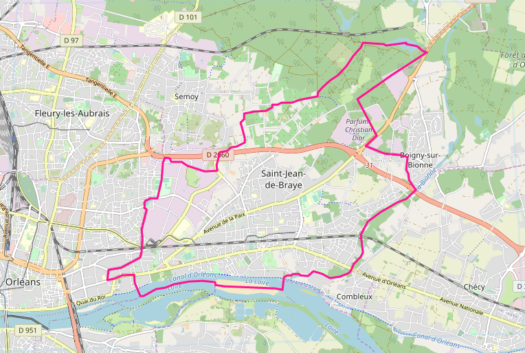 carte réalisée sur umap This map may be incomplete, and may contain errors. Don't rely solely on it for navigation.